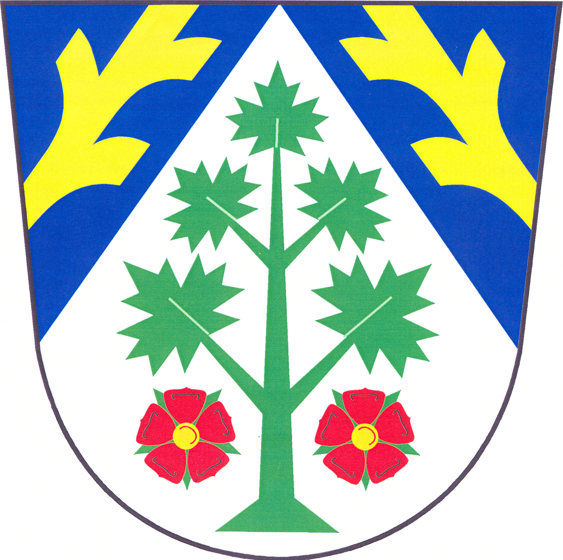 Znak obce Heřmánkovice